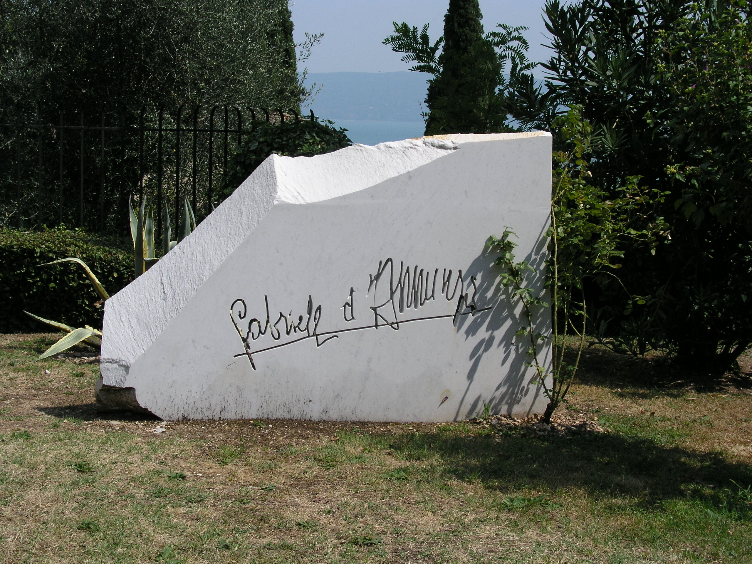 Firma di Gabriele d'Annunzio al Vittoriale